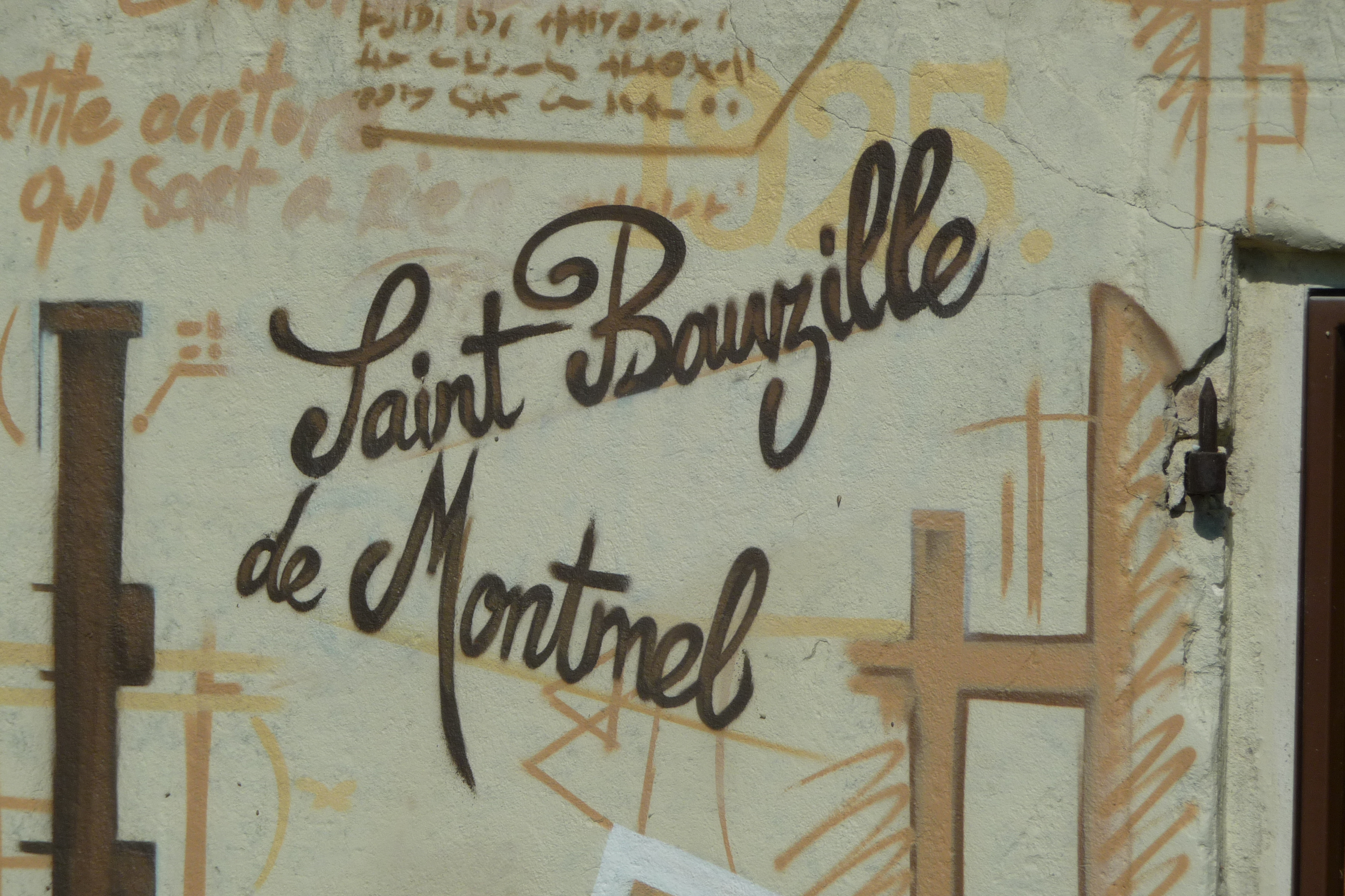 Saint Bauzille de Montmel Décoration de l'ancien puits communal à l'entrée du village